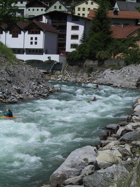 Beschrijving